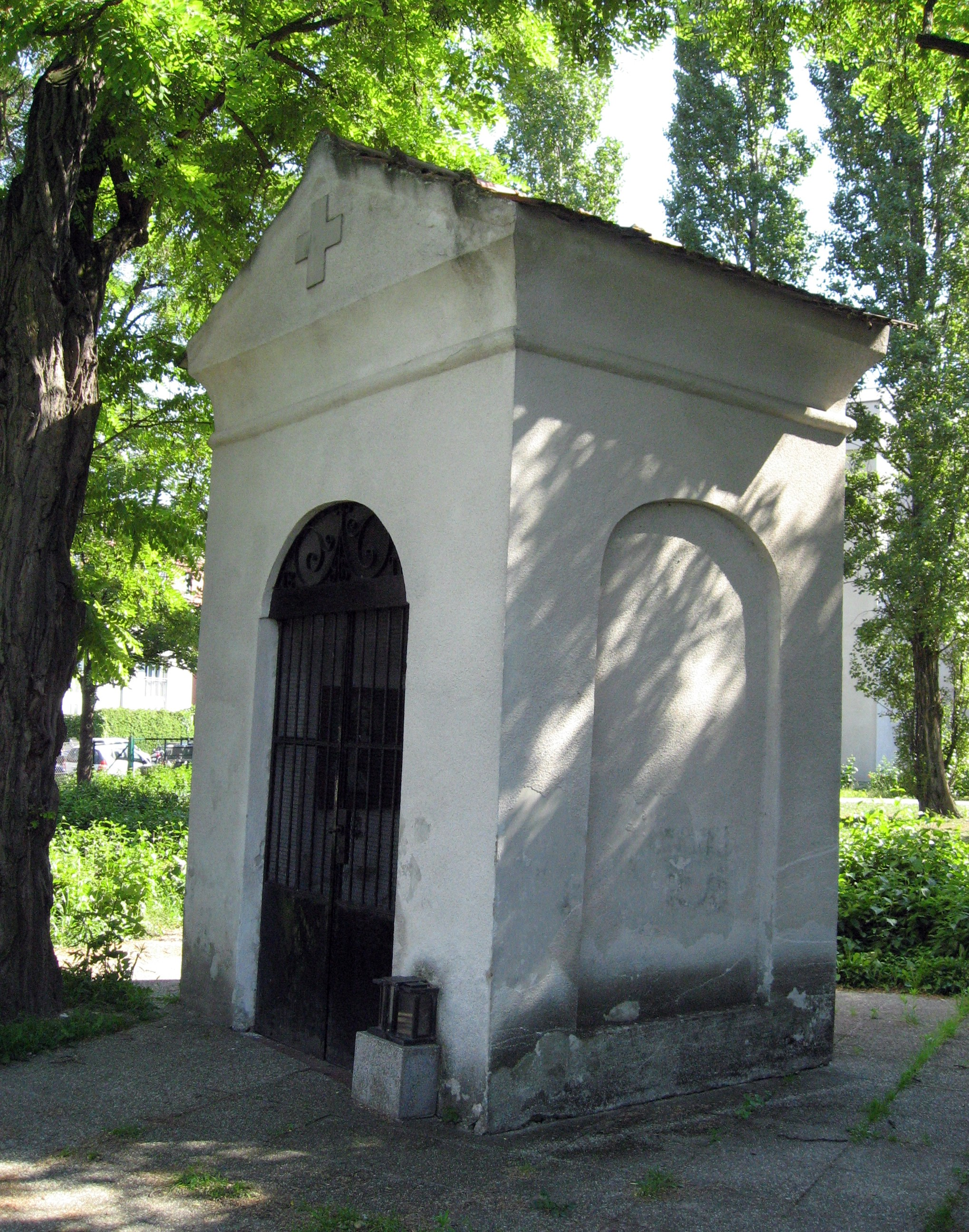 Feldkapelle am Kapellenweg in Wien, Donaustadt